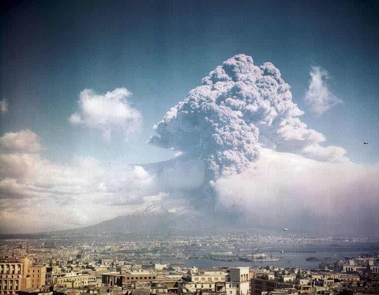 Napoli - Eruzione del Vesuvio nel 1944.